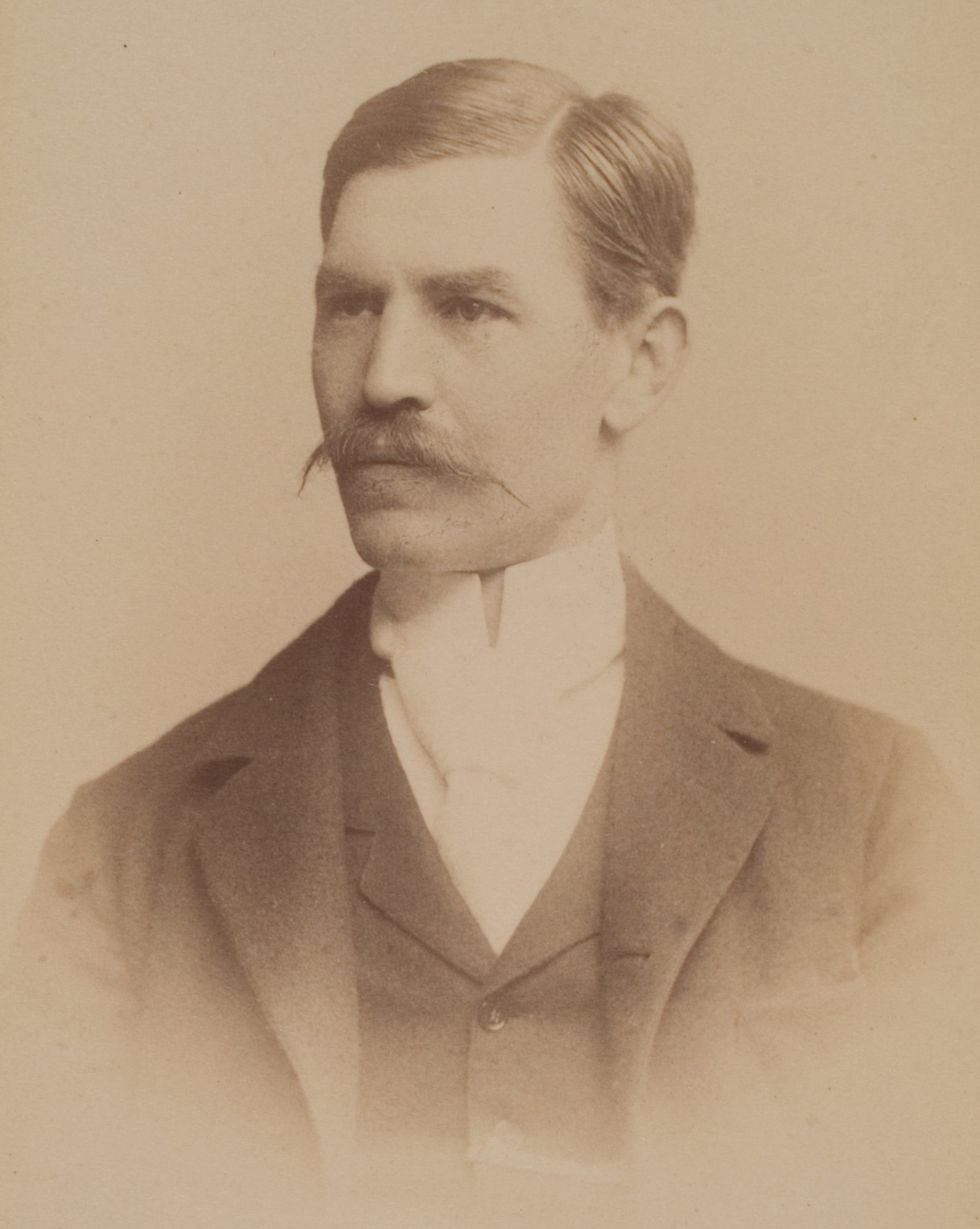 Joseph Schick, Anglist, 1894–1896 Professor in Heidelberg